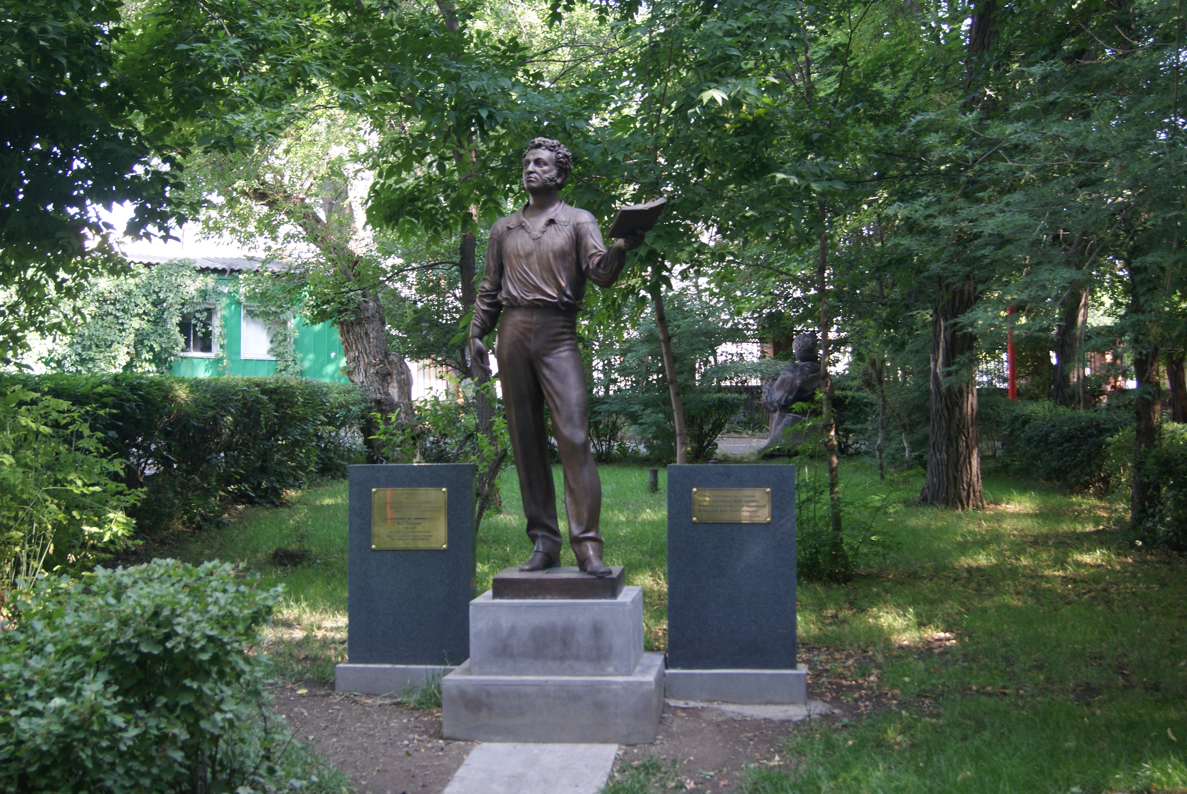 Գյումրու Գորկի զբոսայգի 1/14